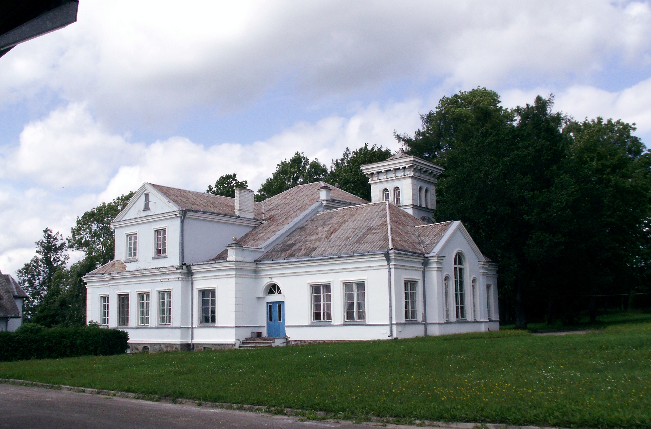 Paežeriai, Šiaulių rajonas